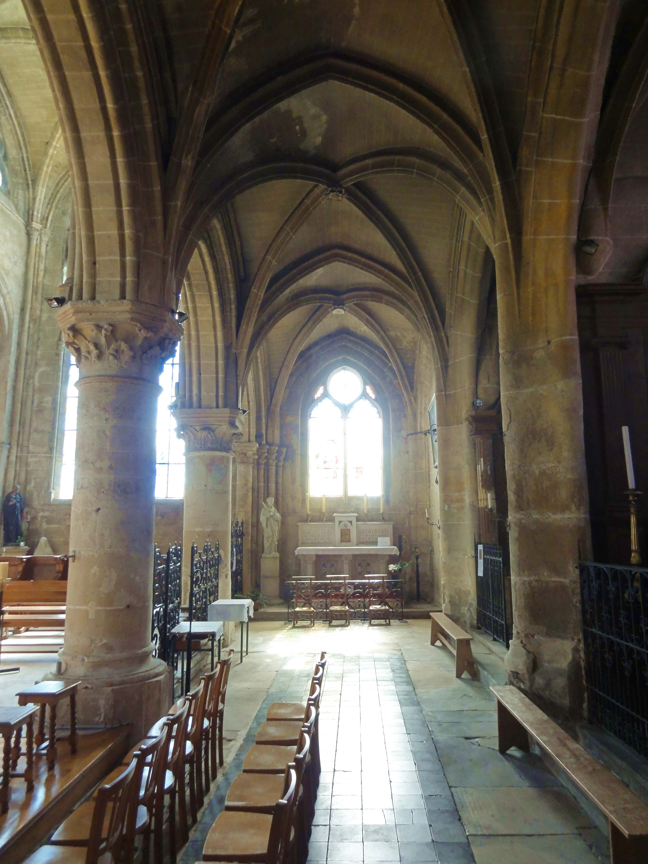 Intérieur de l'église - voir titre.